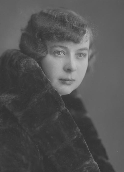 Margarita Trombini-Kazuro